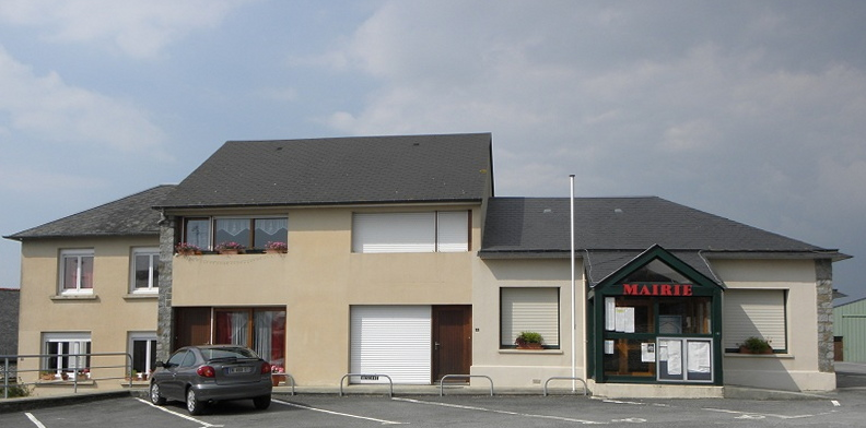 Mairie de Huisnes-sur-Mer (50).